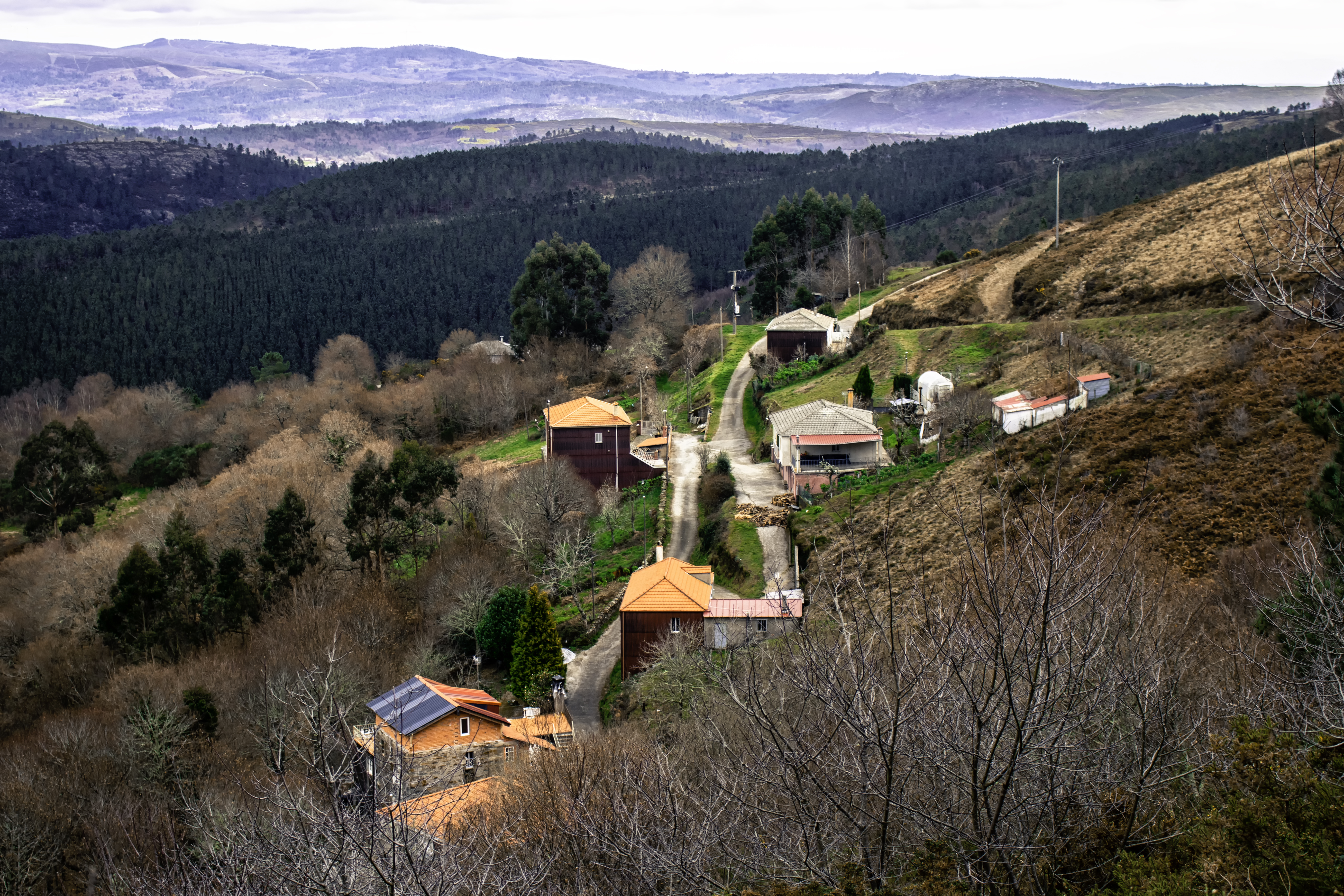 Cerdeira de Arriba, O Regueiro, O Irixo.